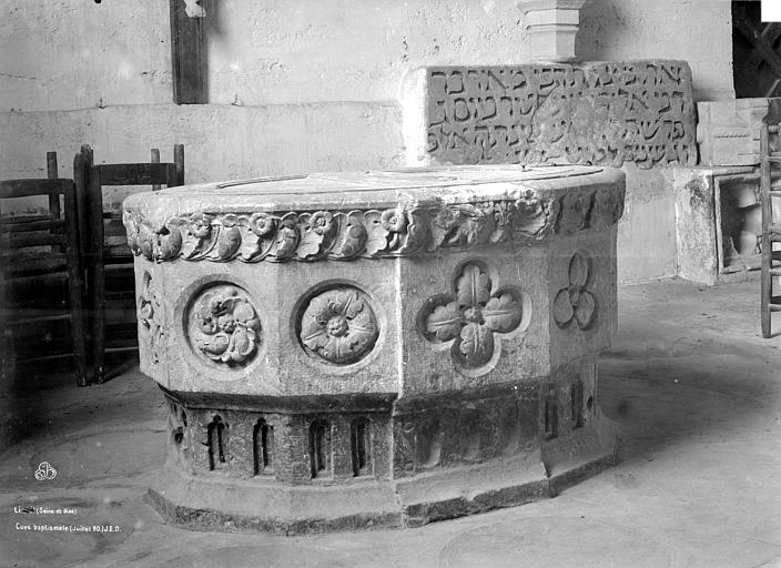 Cuve baptismale